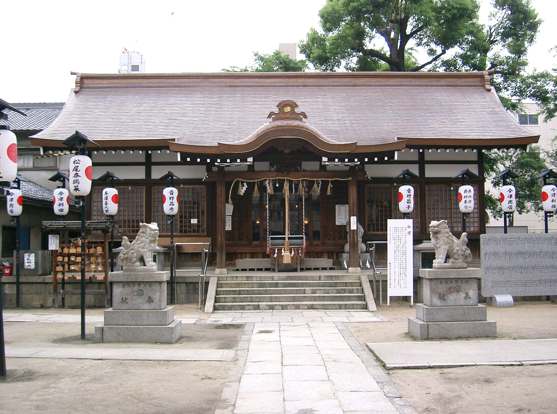 敷津松之宮 拝殿